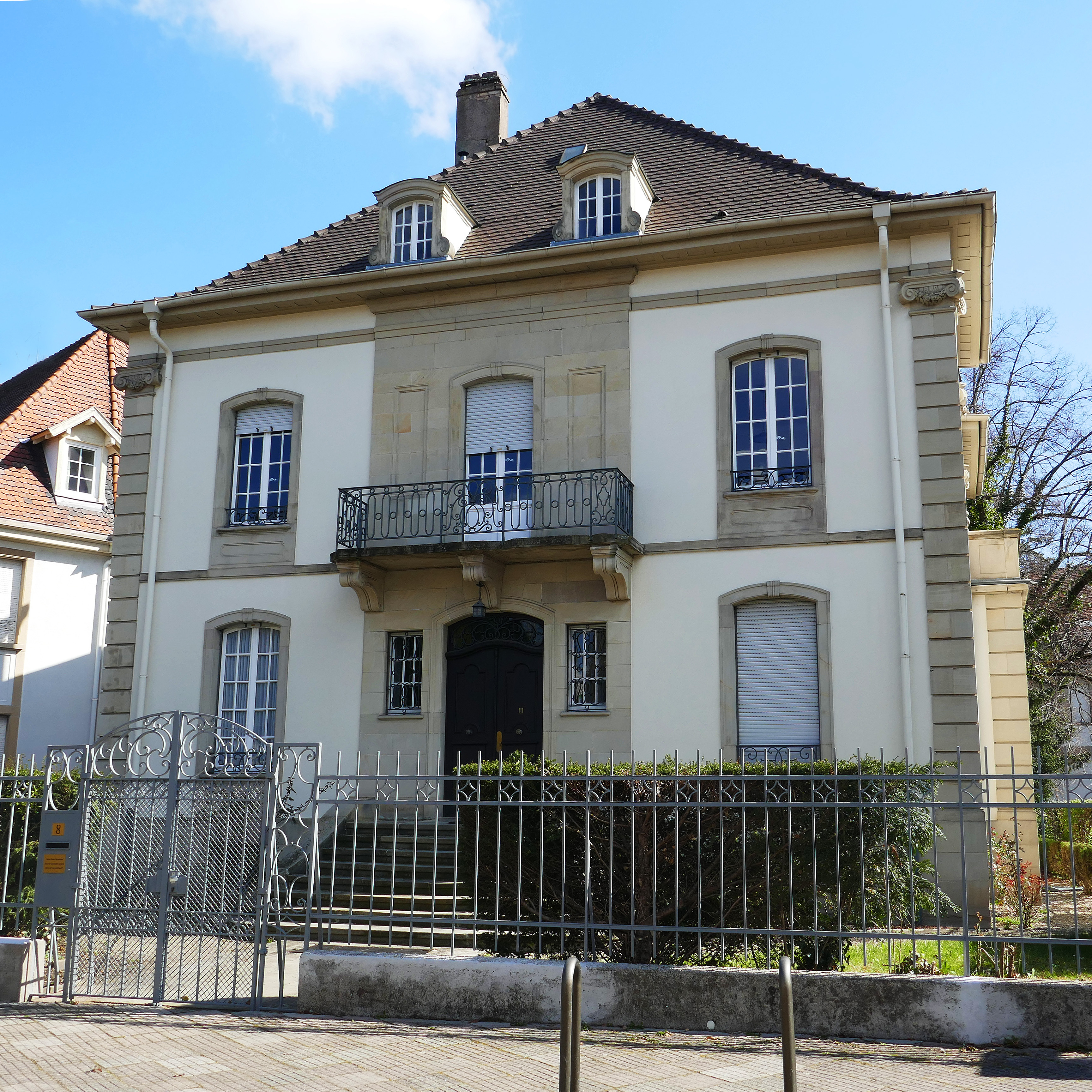 Centre d'études œcuméniques. 8, rue Gustave-Klotz. Strasbourg.